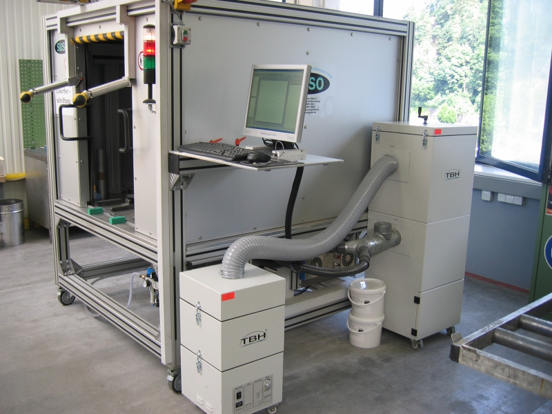 Filtersystem bei der Laserbearbeitung für Produktion von Autofelgen. Rechts: FPV 100, Vorabscheider. Links: LN 230, Filtergerät.